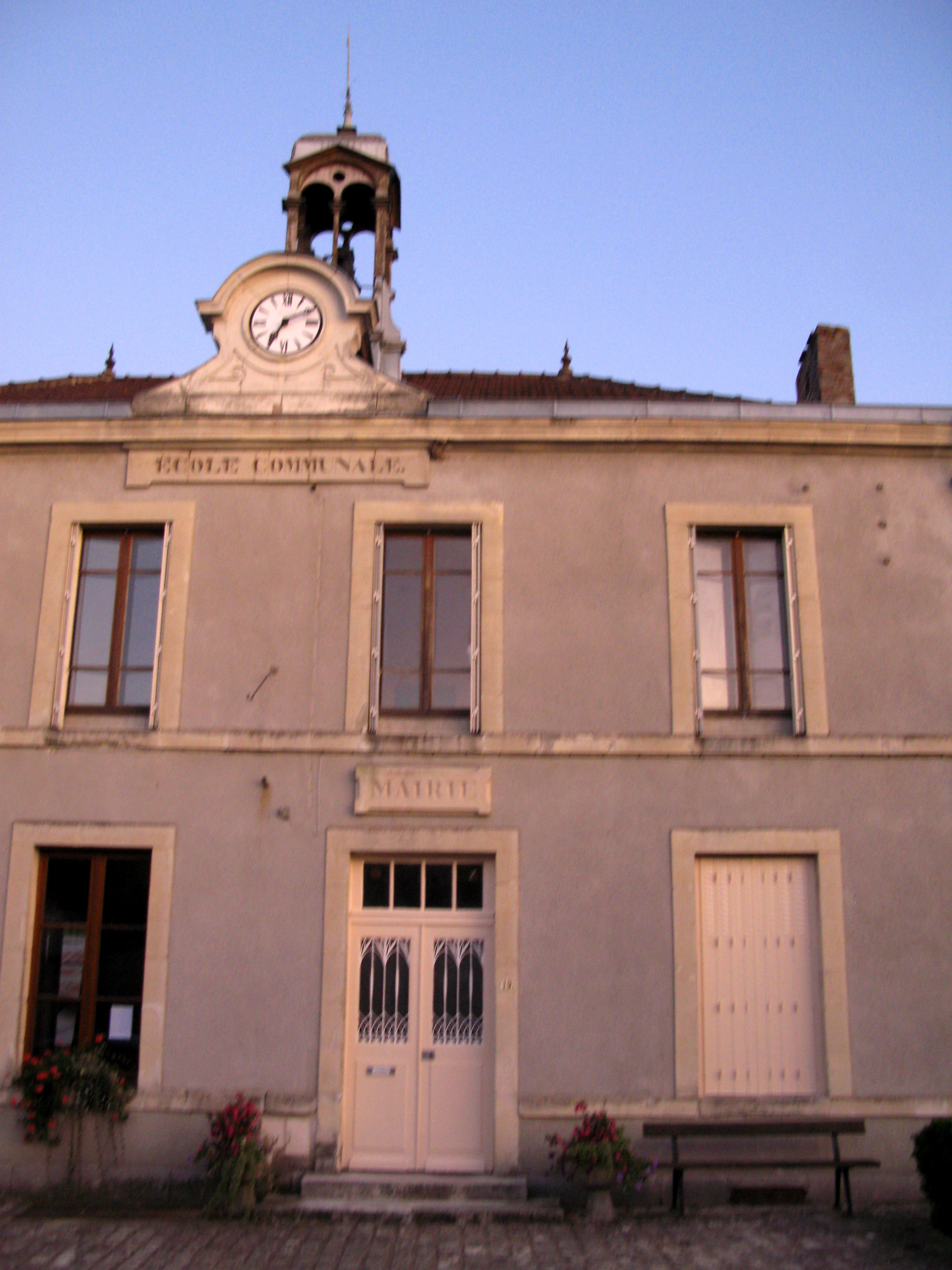 Arcis-le-Ponsart (Marne, France) - La mairie. . (Désolé !... photo légèrement floue, à cause de la faible luminosité en fin de journée.)